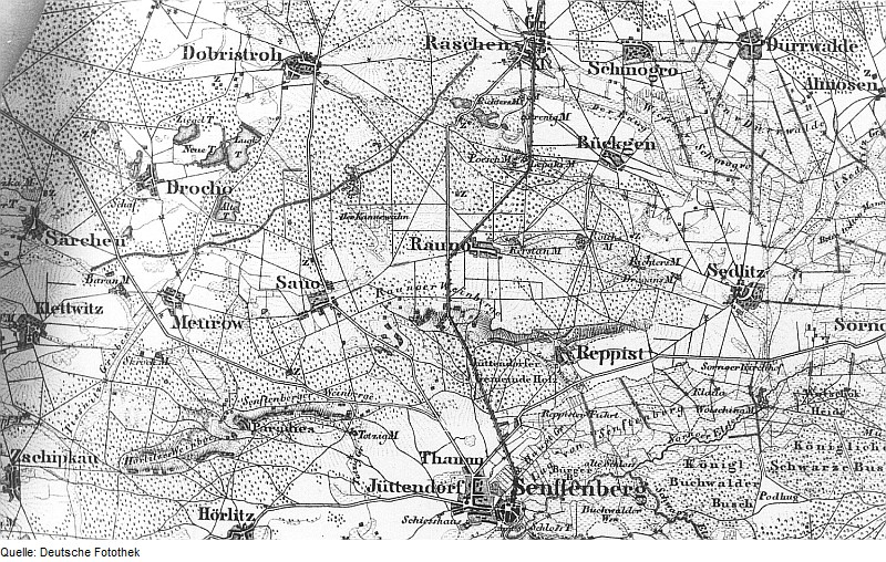 Original image description from the Deutsche Fotothek Senftenberg-Sedlitz. Topographische Karte vom Preußischen Staate, Blatt 233 Alt Döbern, grav. 1850